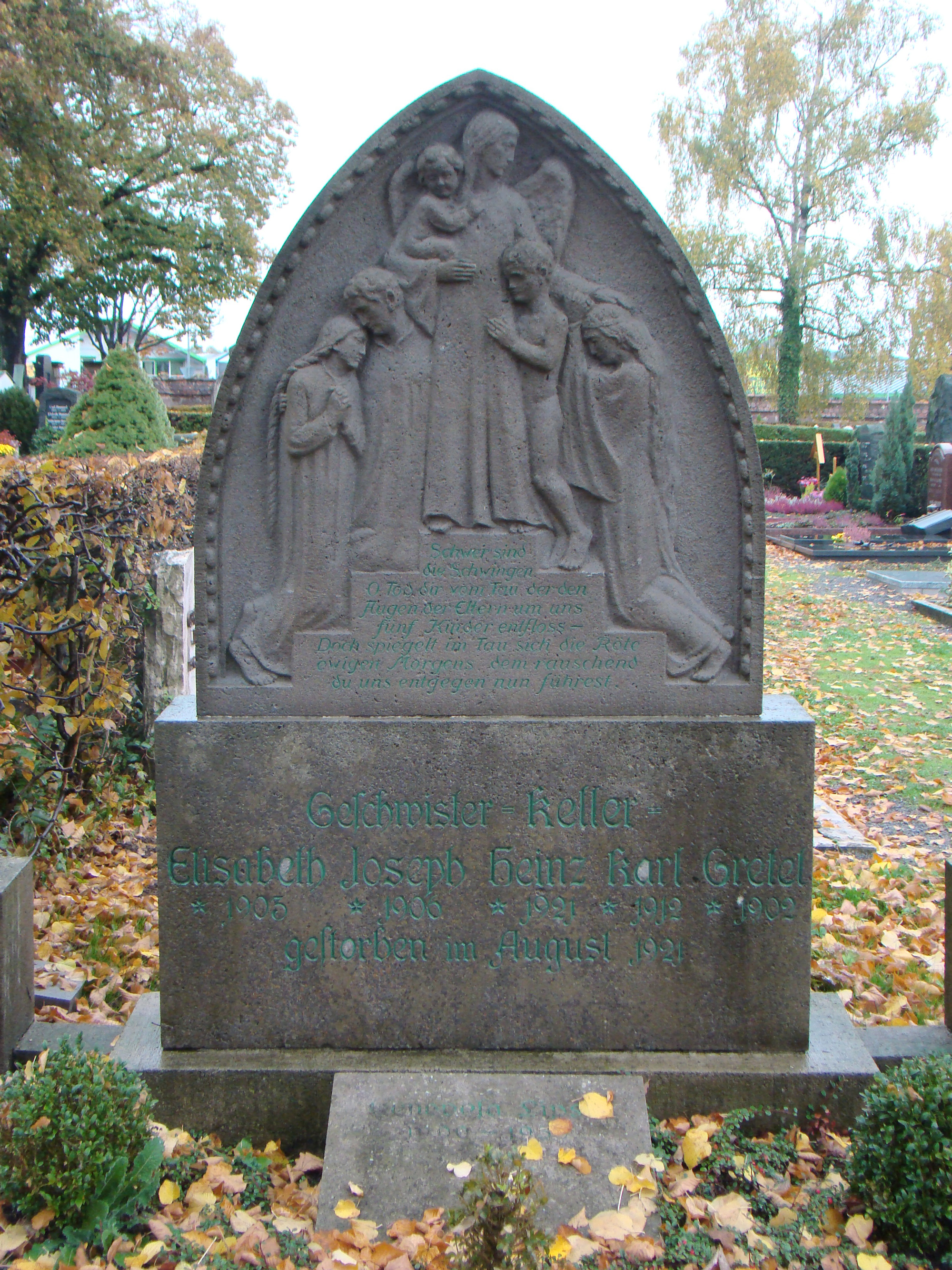 Grabstein der fünf im Jahr 1921 verstorbenen Kinder des Bildhauers Conrad Keller in Wiesloch